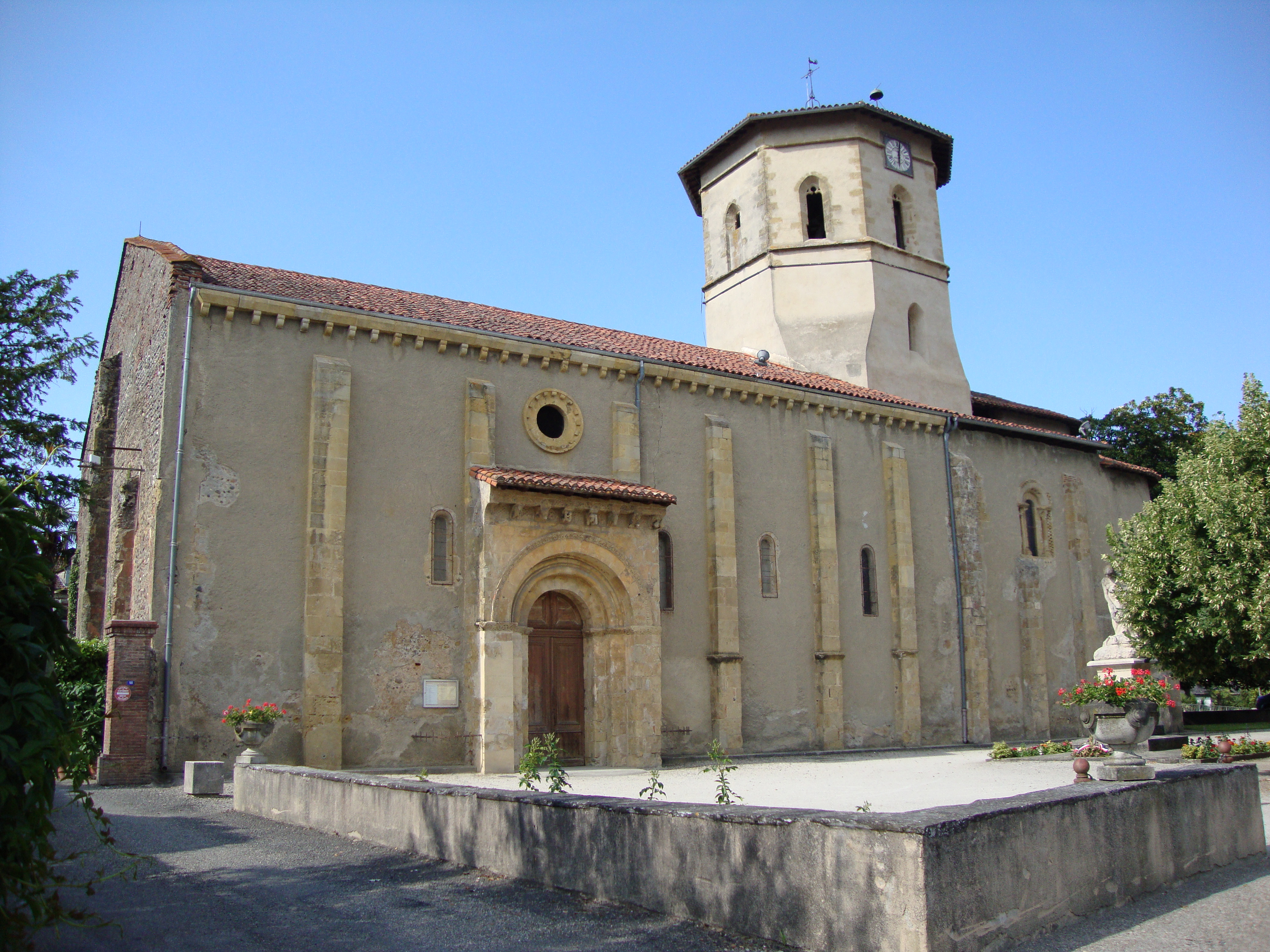 Maubourguet (Hautes-Pyr, Fr) l'église